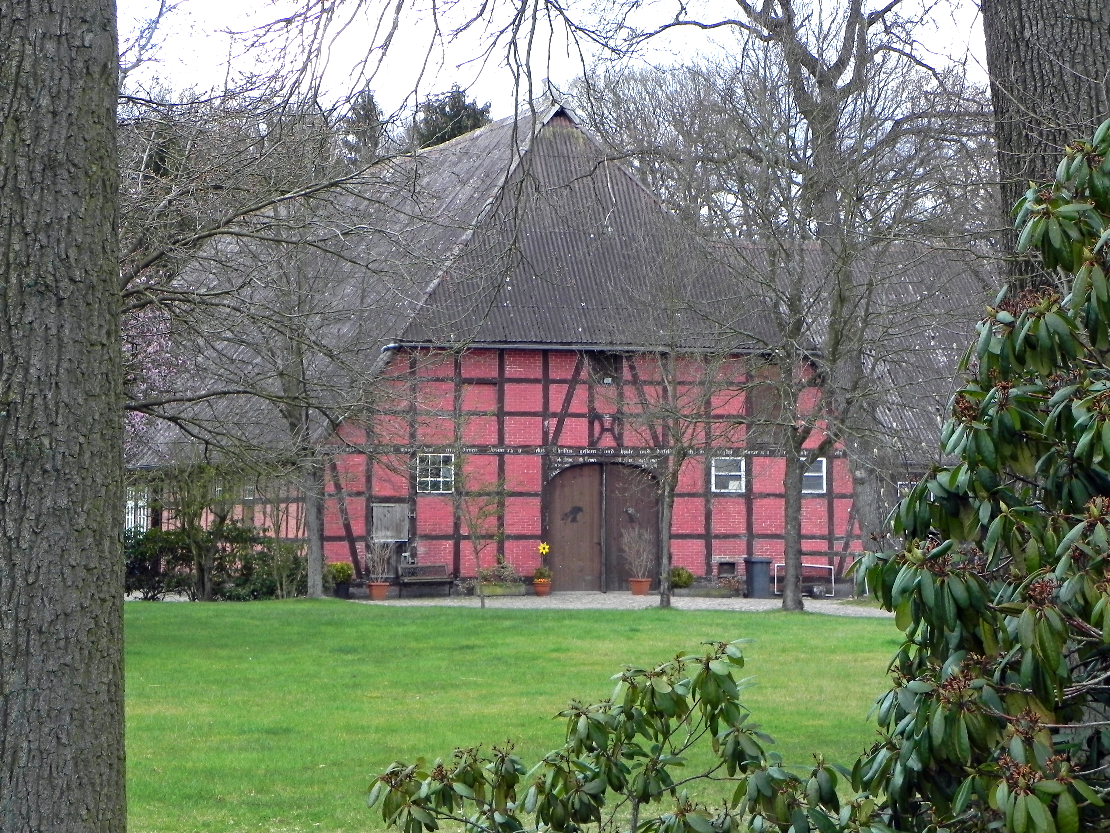 Fachwerk-Bauernhaus in Schmarbeck, Niedersachsen, Germany